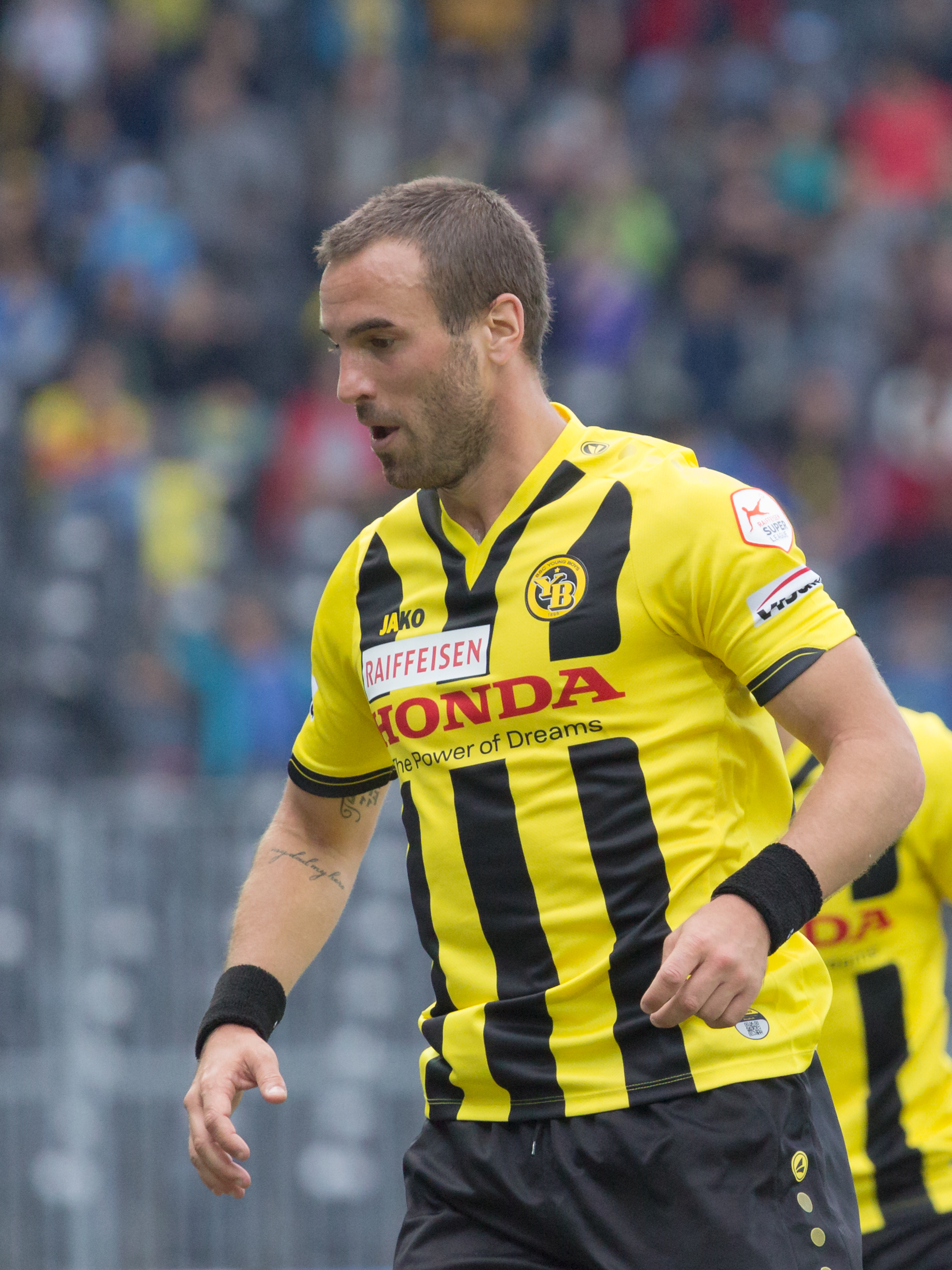 Scott Sutter beim Spiel des BSC Young Boys gegen den FC Luzern